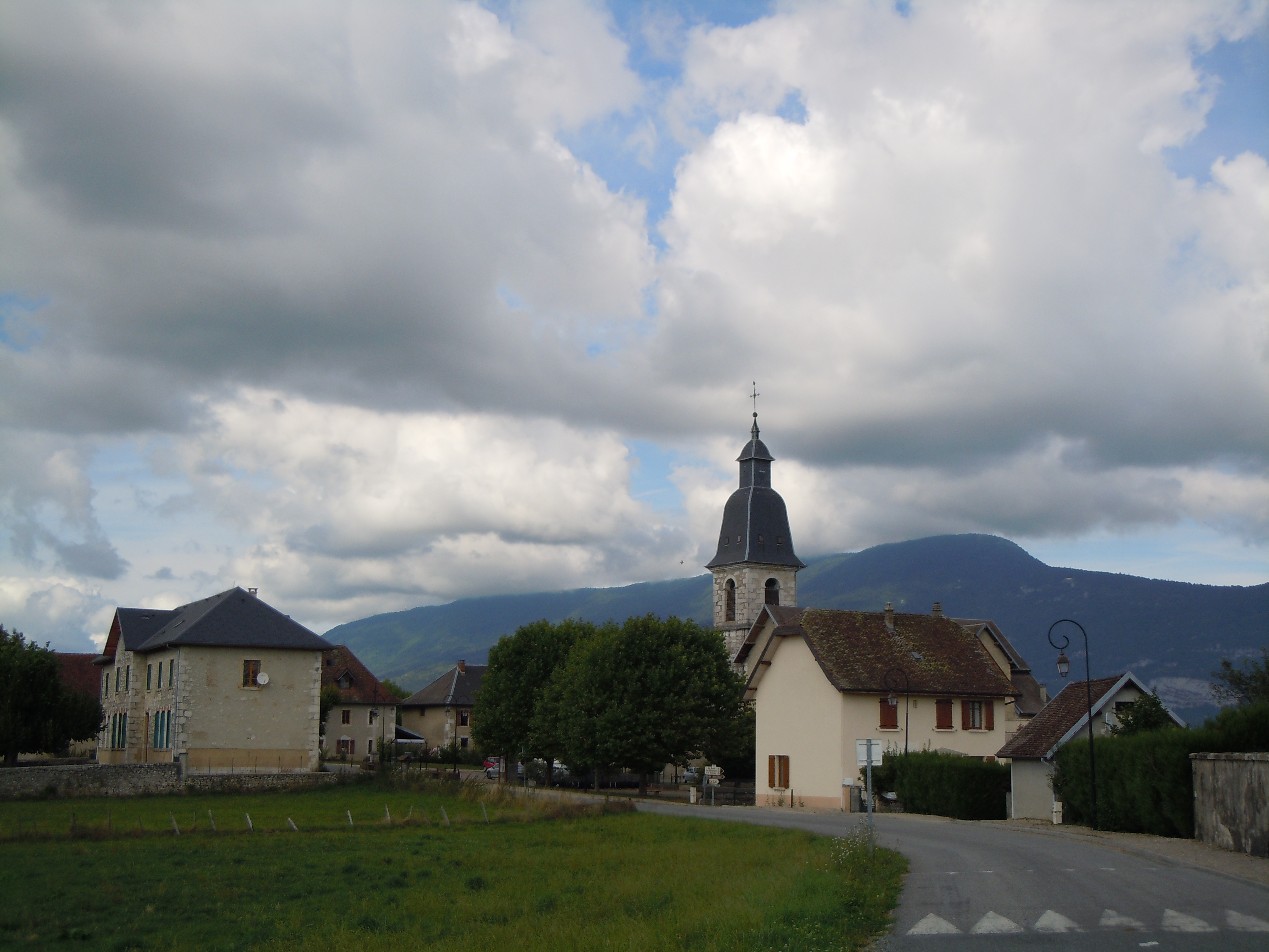 Ayn - Savoie